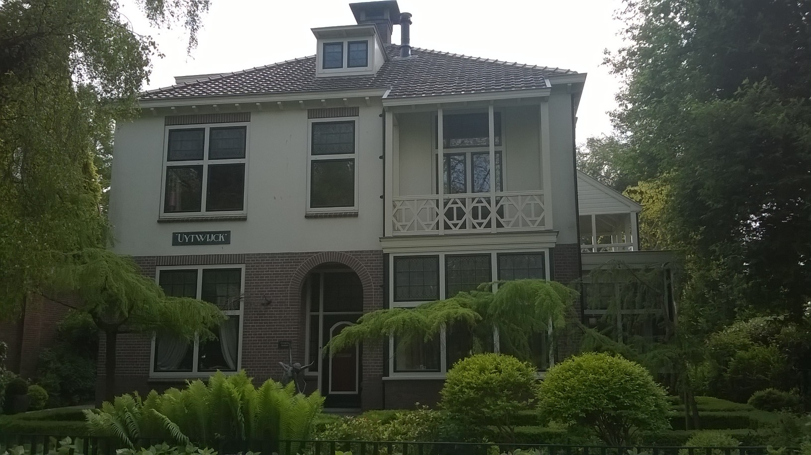 Gemeentelijk monument aan het Wilhelminaplantsoen 43 in Enkhuizen.